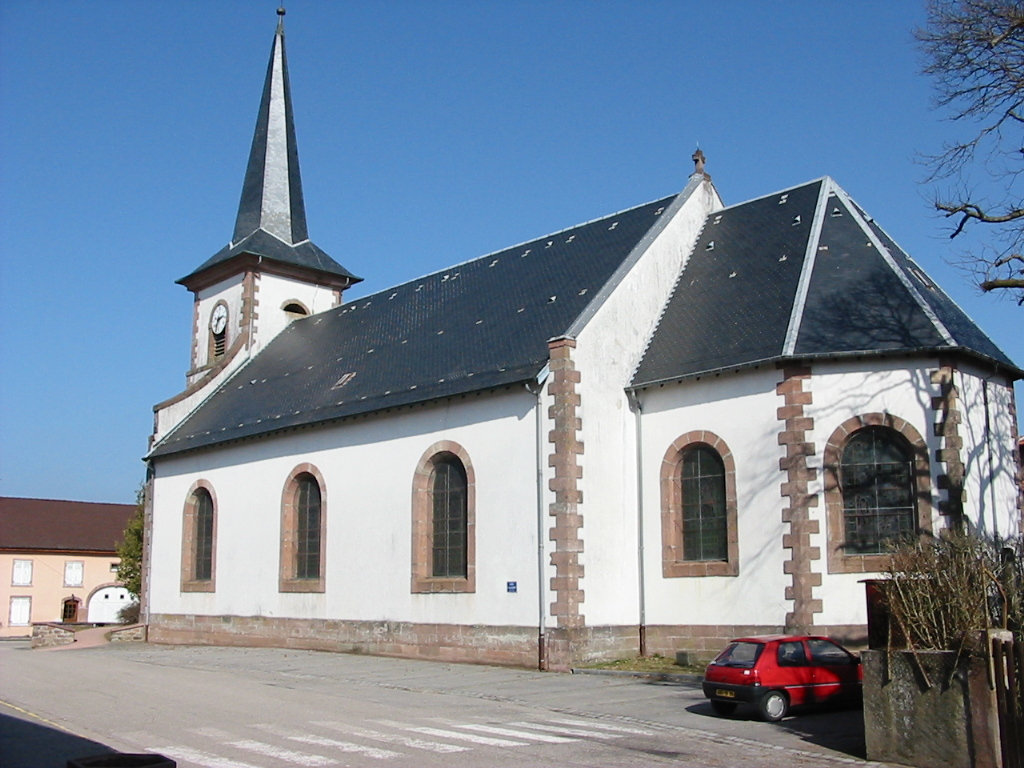 Saint-Remy Commune des Vosges L'église Saint-Remy Photographie personnelle, prise le 19 mars 2006 Copyright © Christian Amet